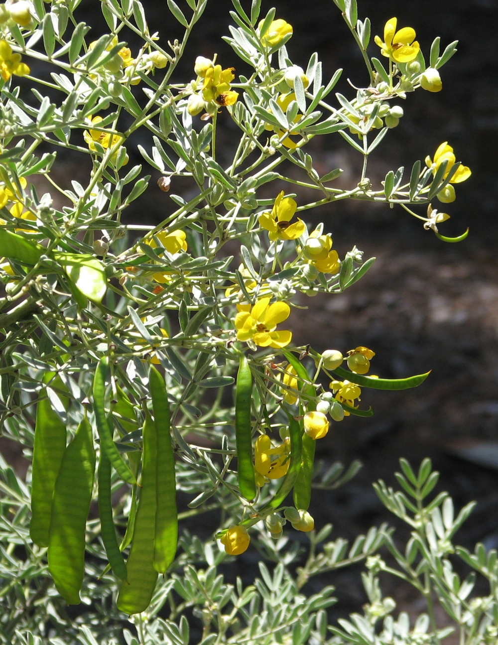 Senna artemisioides subsp. quadrifolia, Geelong Botanic Gardens, Victoria, Australia